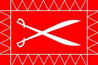 L'ancien drapeau du Maroc a parti de 1666 jusqu'a 1915 ce drapeau était utilisé